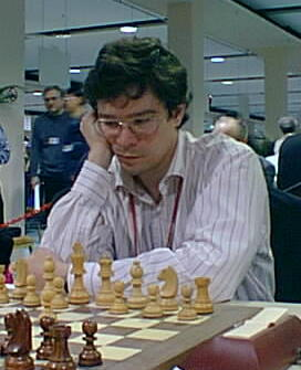 GM Rustem Dautov (Germany), Istanbul (ol) 2000